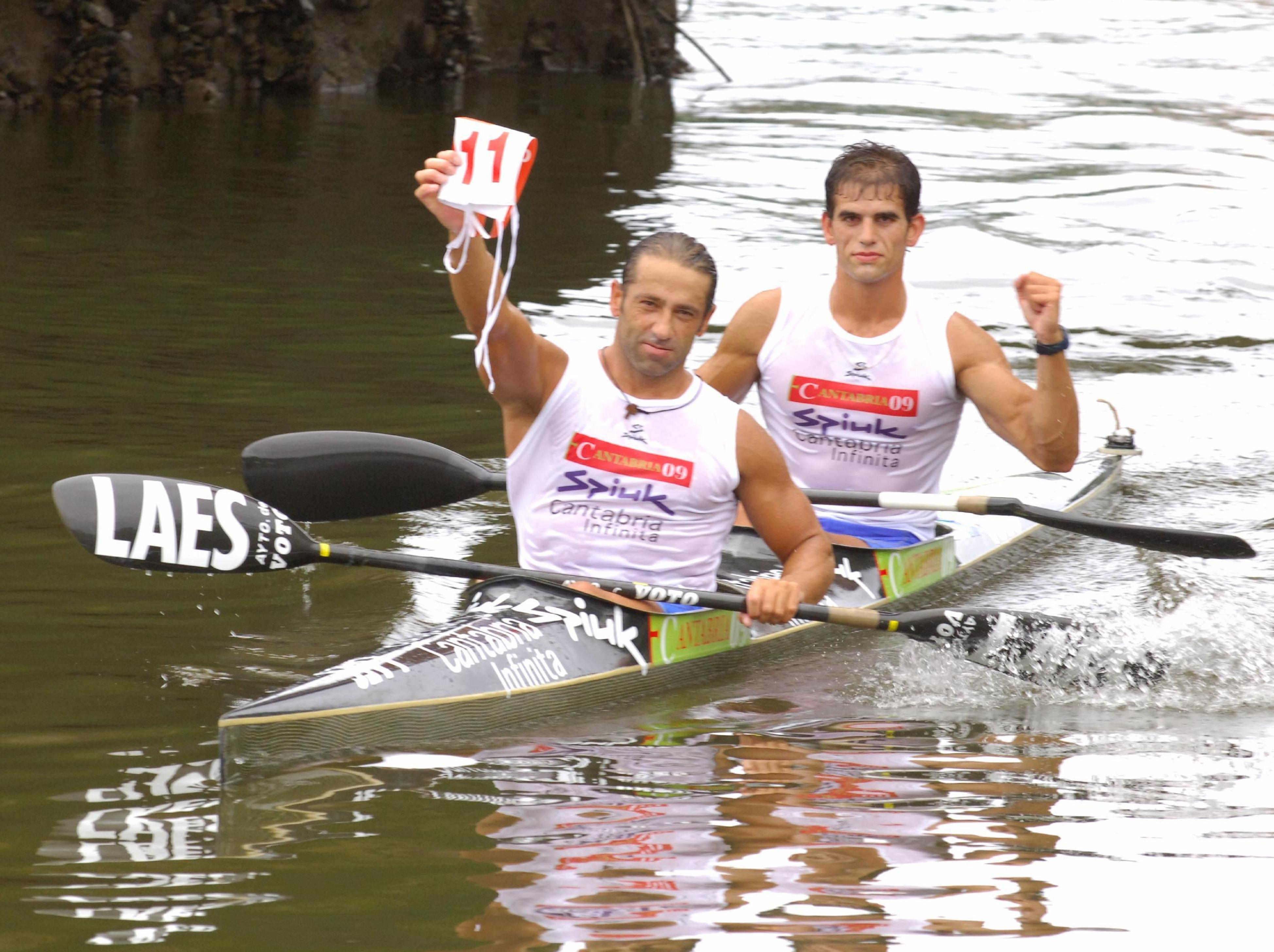 Martínez y Castañón en meta del Sella 2009.